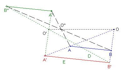 composée de deux homothétie telles que kk' différent de 1. Image personnelle. Licence GFDL